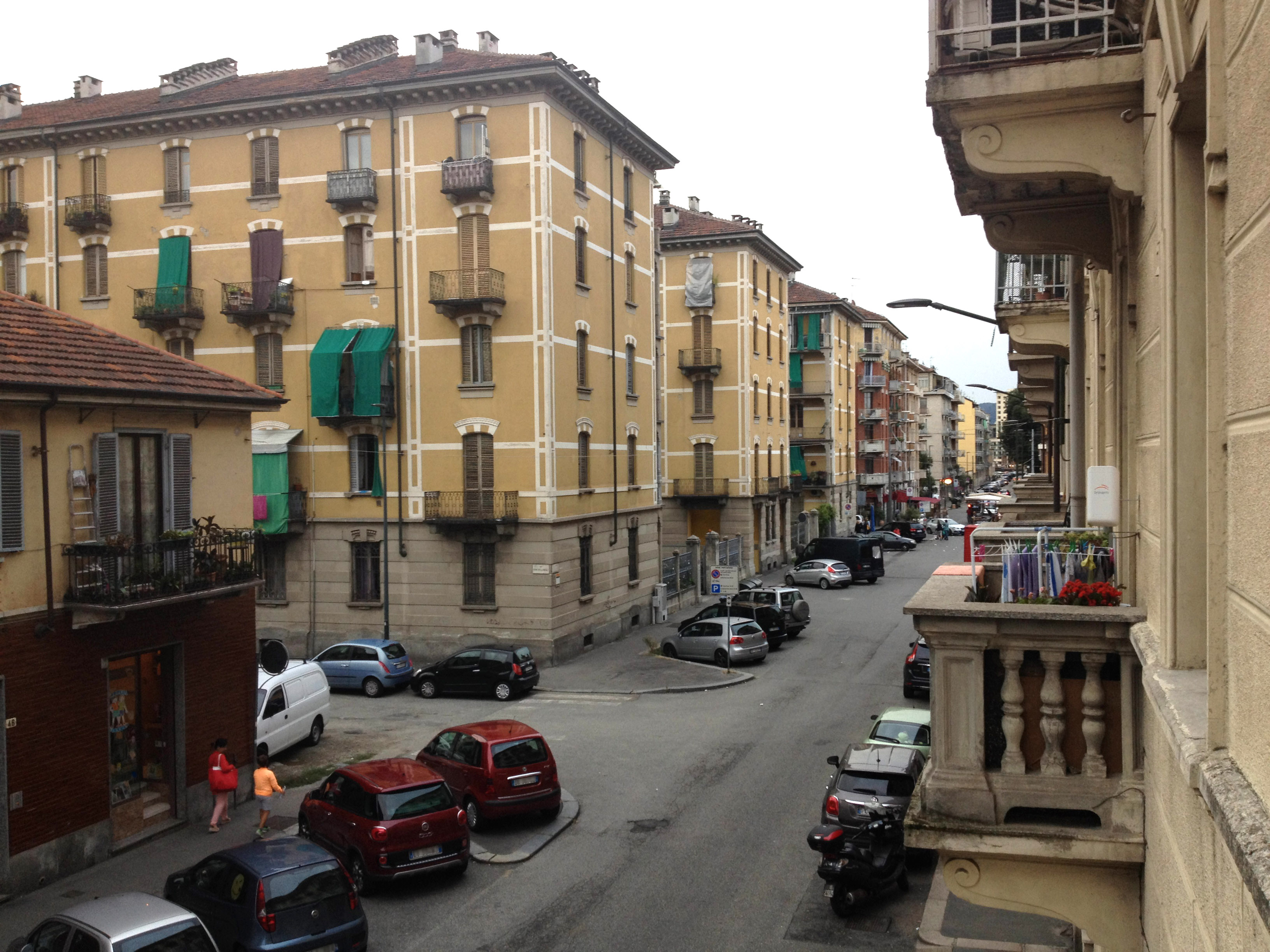 Torino, via Villar, scorcio delle Case Popolari erette nel 1910.